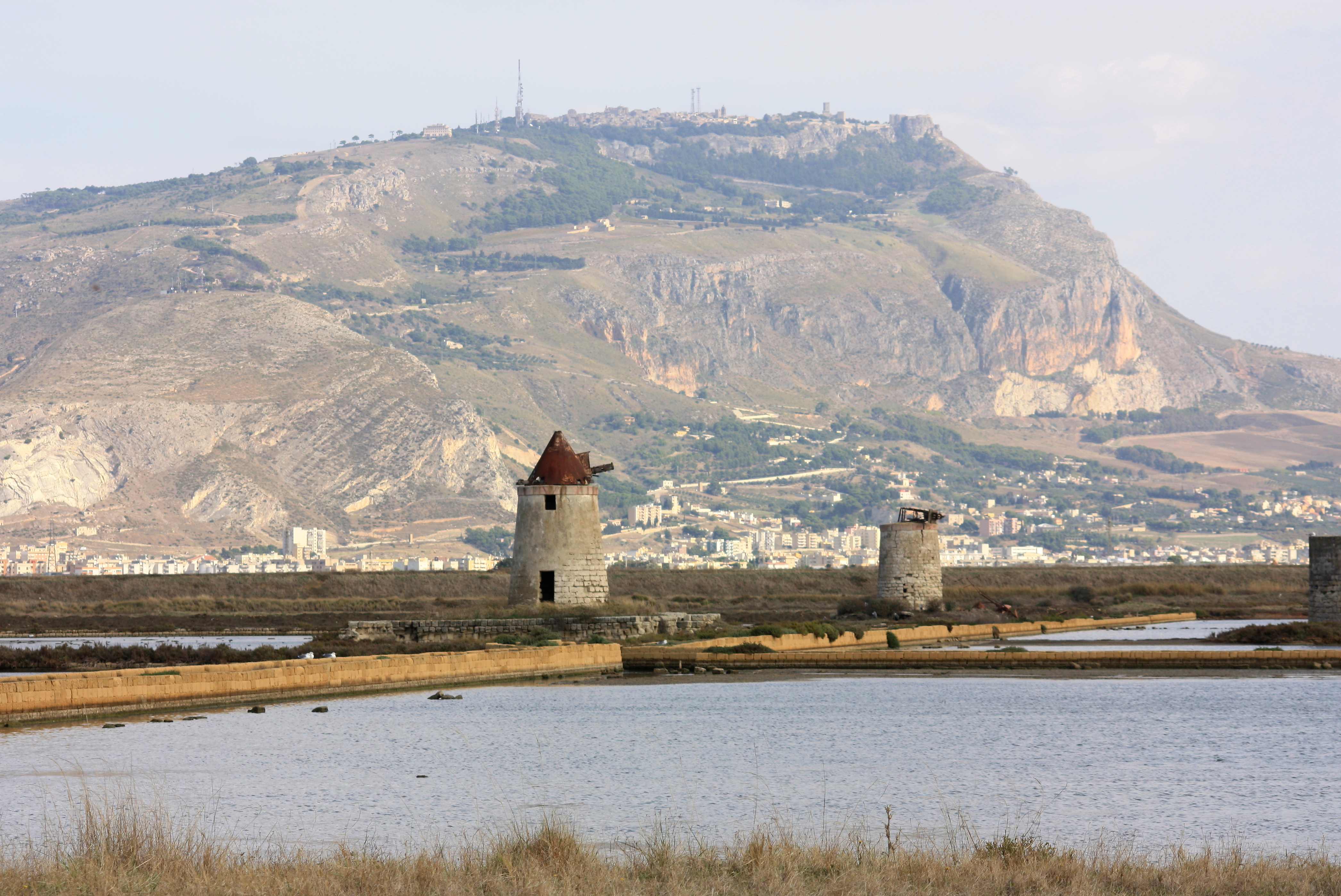 Nubia_-_saline_e_vetta_d'Erice